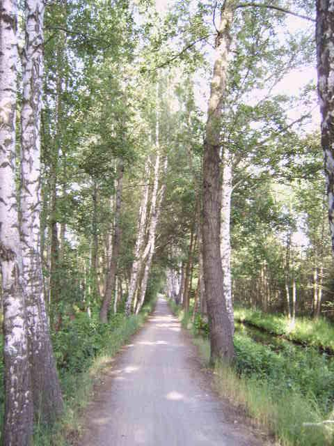 Weg von Lübbenau nach Leipe, Bundesland Brandenburg, Deutschland Bild aufgenommen am 21.6.2006 von Olaf Meister